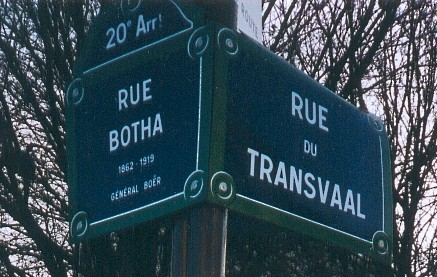 FC Georgio Paris